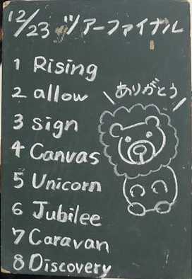 amiinAセトリボード(20181226(1))